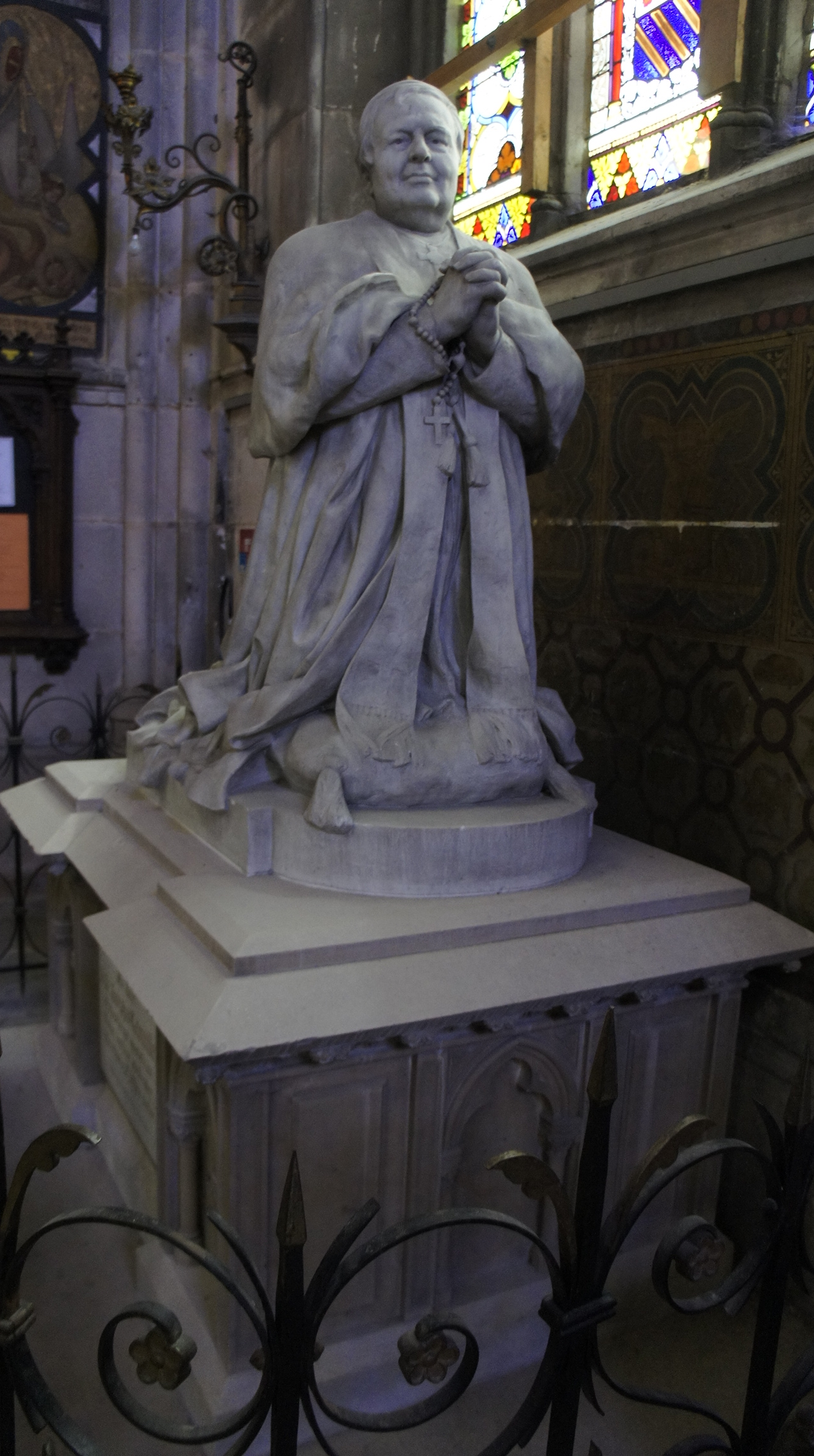 Ernest Bussière, Orant de Monseigneur Trouillet à l'intérieur de la basilique Saint-Epvre de Nancy.